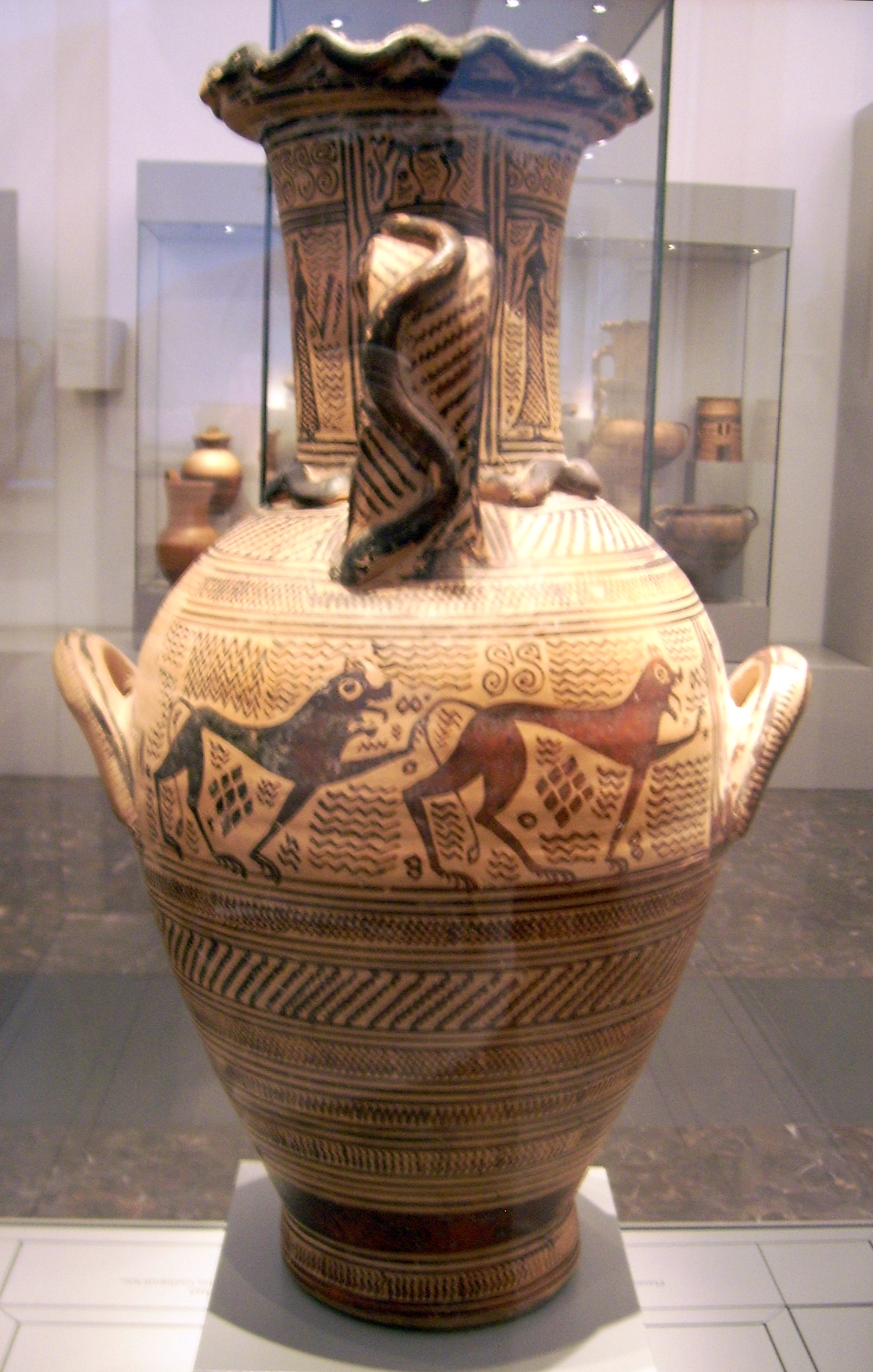 Frühattische Hydria des Mesogaia-Malers; plastische Schlangen an Gefäßlippe, Hals und Henkel was auf eine Verwendung im Grabkult hinweist; Halsbild zeigt Frauenreigen mit einem Jüngling, Gefäßbauch einen Mann hinter zwei Sphingen; um 700 v. Chr., aus Athen, Antikensammlung im Alten Museum Berlin